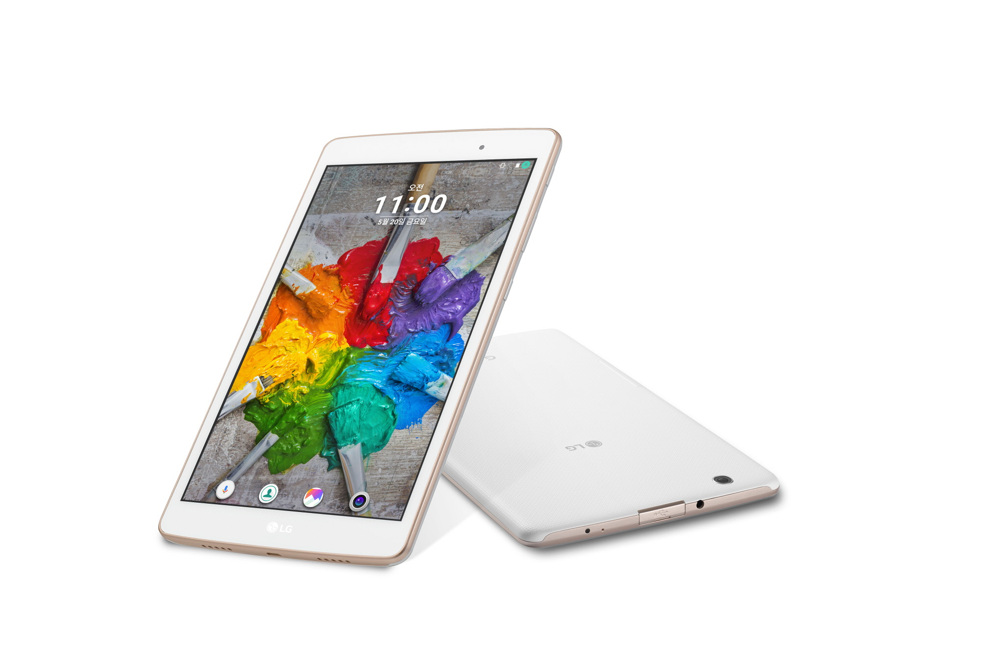 LG전자, ‘G PadⅢ 8.0’ 출시 ■ ‘풀HD IPS 디스플레이’로 더욱 선명한 화질 제공 ■ 인터넷 강의, 영화 시청에 최적화 된 16:10 비율 ■ 눈의 피로를 덜어주는 4단계 ‘리더모드’ 탑재 ■ 표준 USB 2.0 포트, MS 오피스 패키지 등으로 사용 편의성 높여 ※ Social LG전자 ( 에서 관련 보도자료를 확인하실 수 있습니다.